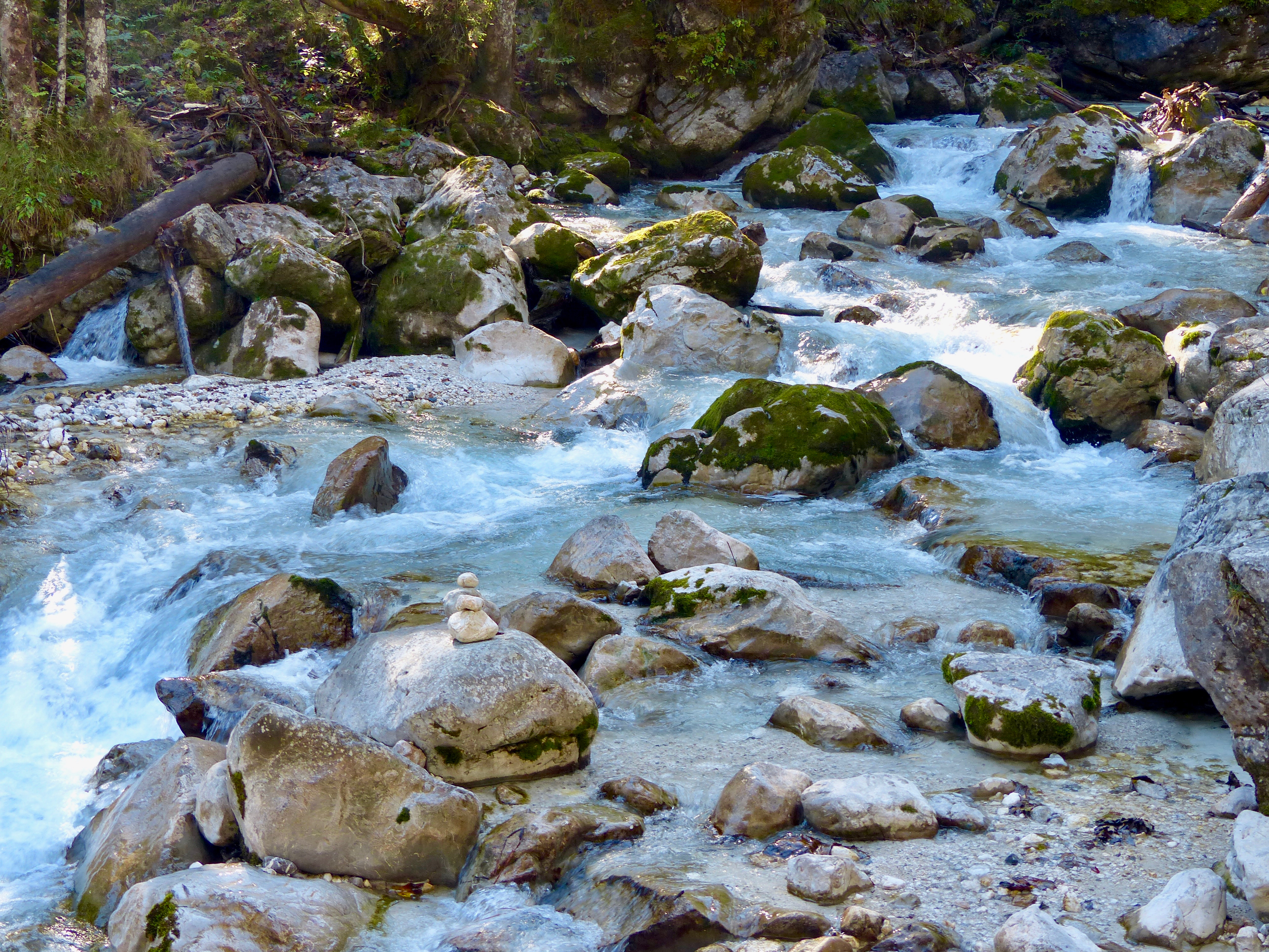 Geotop Zauberwald an der Ramsauer Ache: Der Zauberwald gehört zu den "100 schönsten Geotopen Bayerns"